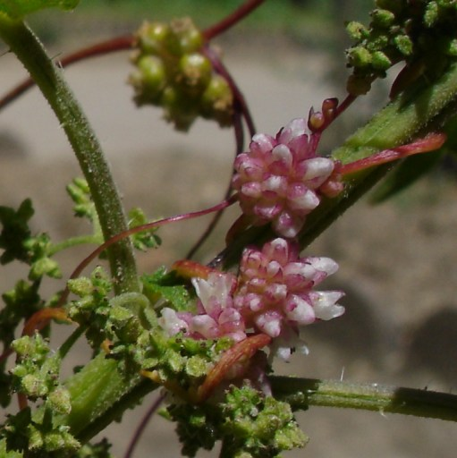 Cuscuta europaea, Jardin des plantes, Paris